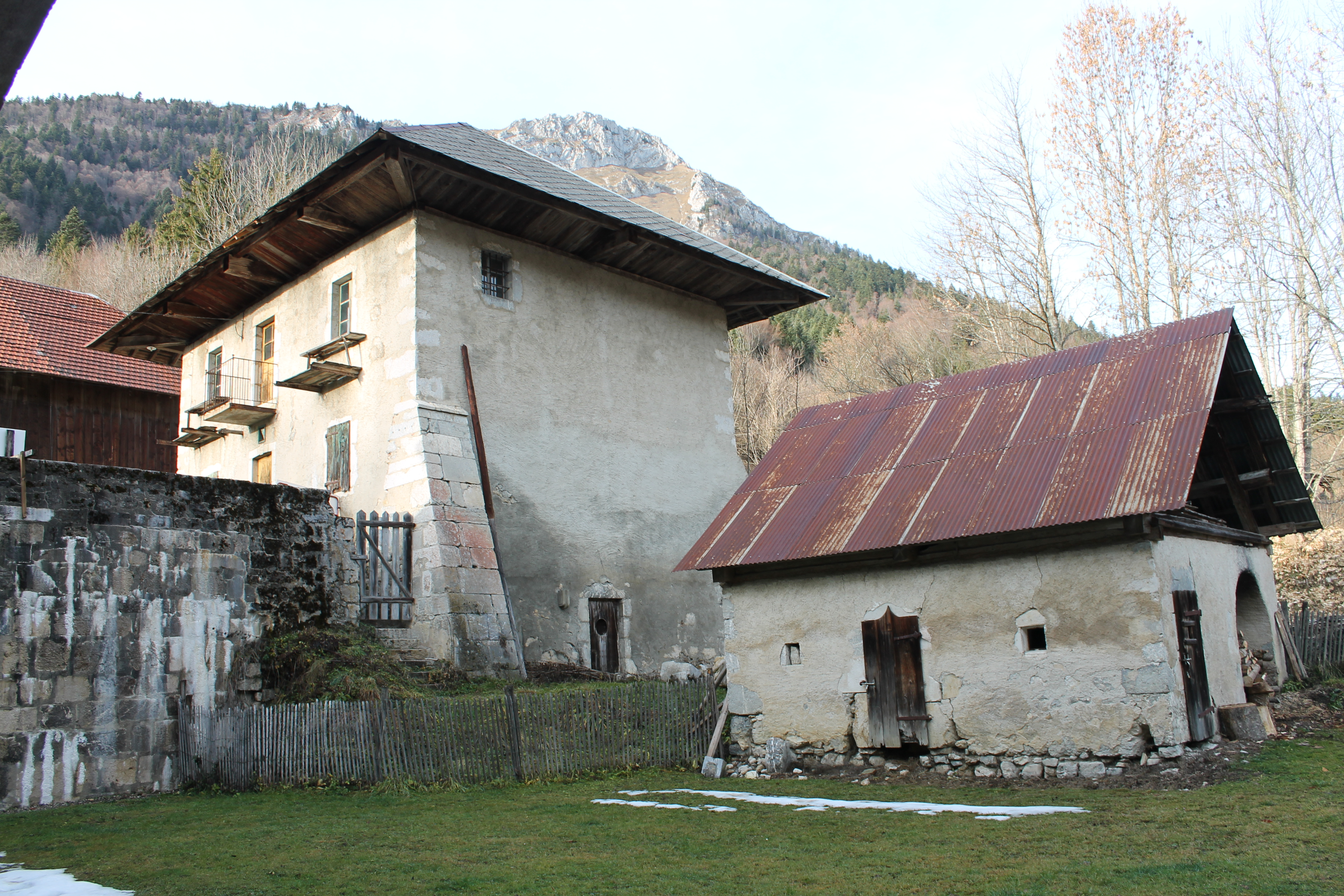 Vue sur l'ancienne cour des obédiences de la Chartreuse d'Aillon